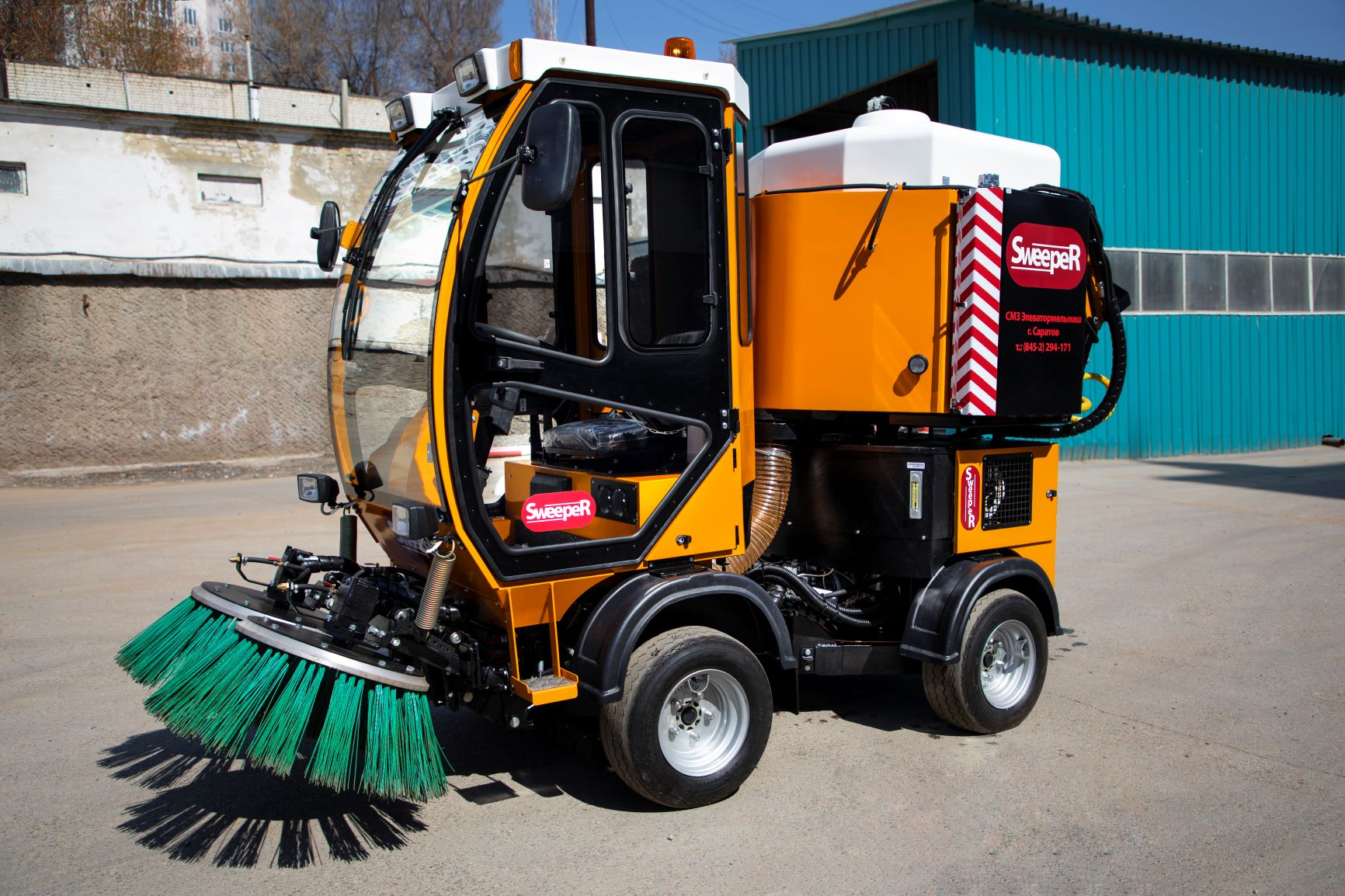 Sweeper ММК-1000 малогабаритная подметально-уборочная машина российского производства. производитель ОАО "СМЗ "Элеватормельмаш" г. Саратов.